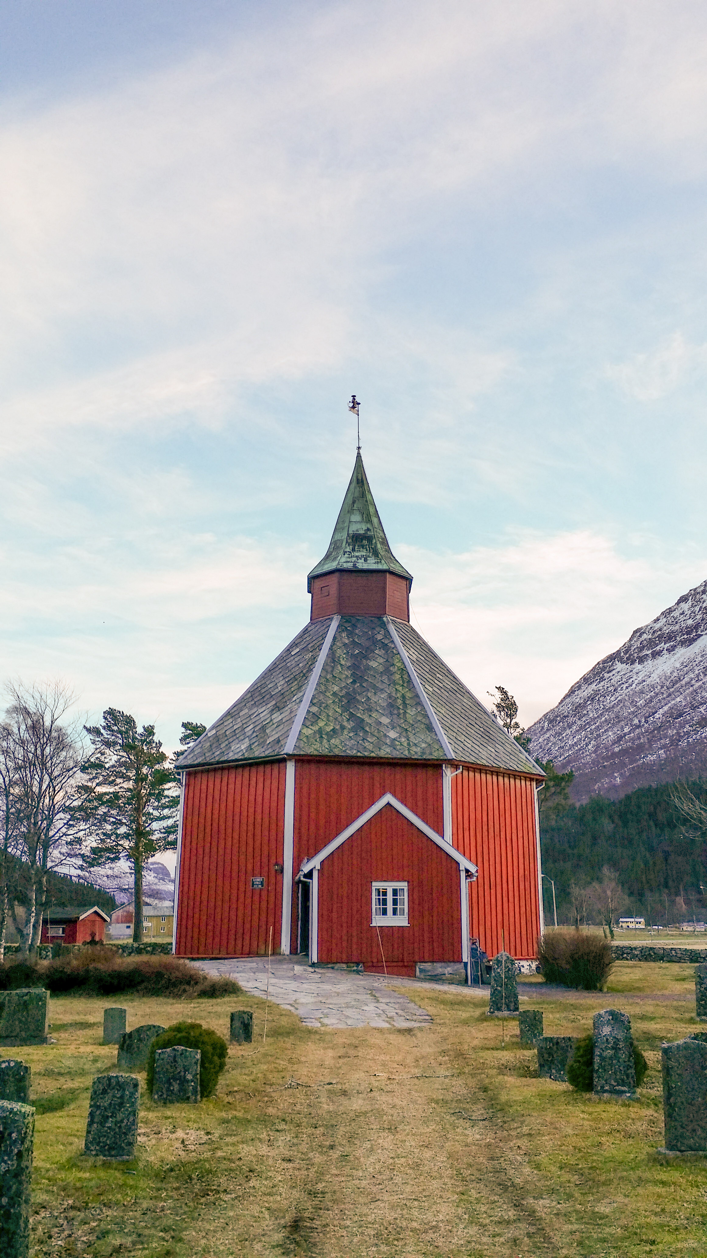 Ålvundeid kirke er en åttekantet kirke fra 1848 i Sunndal kommune, Møre og Romsdal fylke.